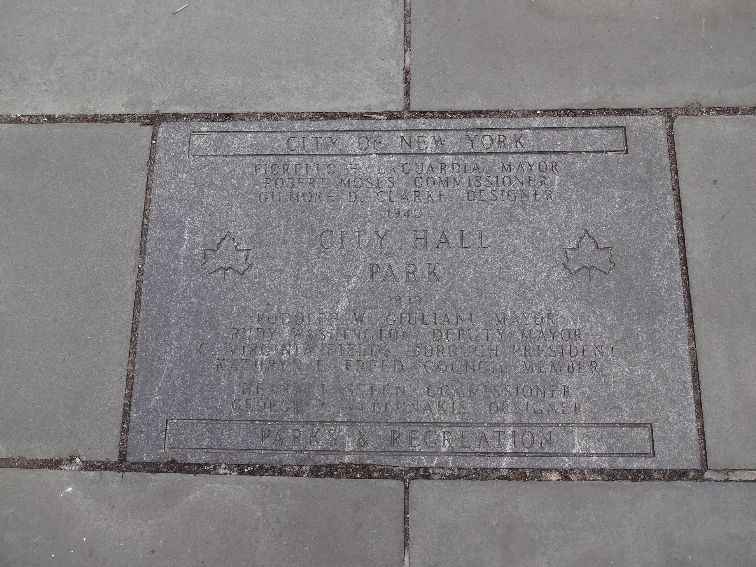 Placa em Praça de Nova Iorque.